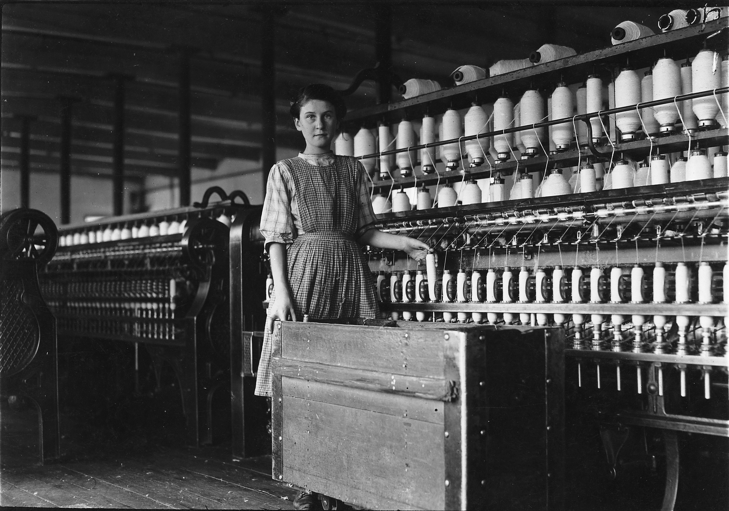 Scope and content: Adrienne Paquette, gaspésienne d’origine, sur son lieu de travail, une filature de Winchendon, Massachusetts, en 1911. La photo a été prise par Lewis Wickes Hine qui a photographié plusieurs jeunes Canadiens-français travaillant dans les usines de la Nouvelle-Angleterre.